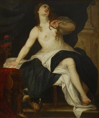 Muerte de Cleopatra, Alcalá Subastas, mayo de 2007, procedente de la colección Comyn de Barcelona